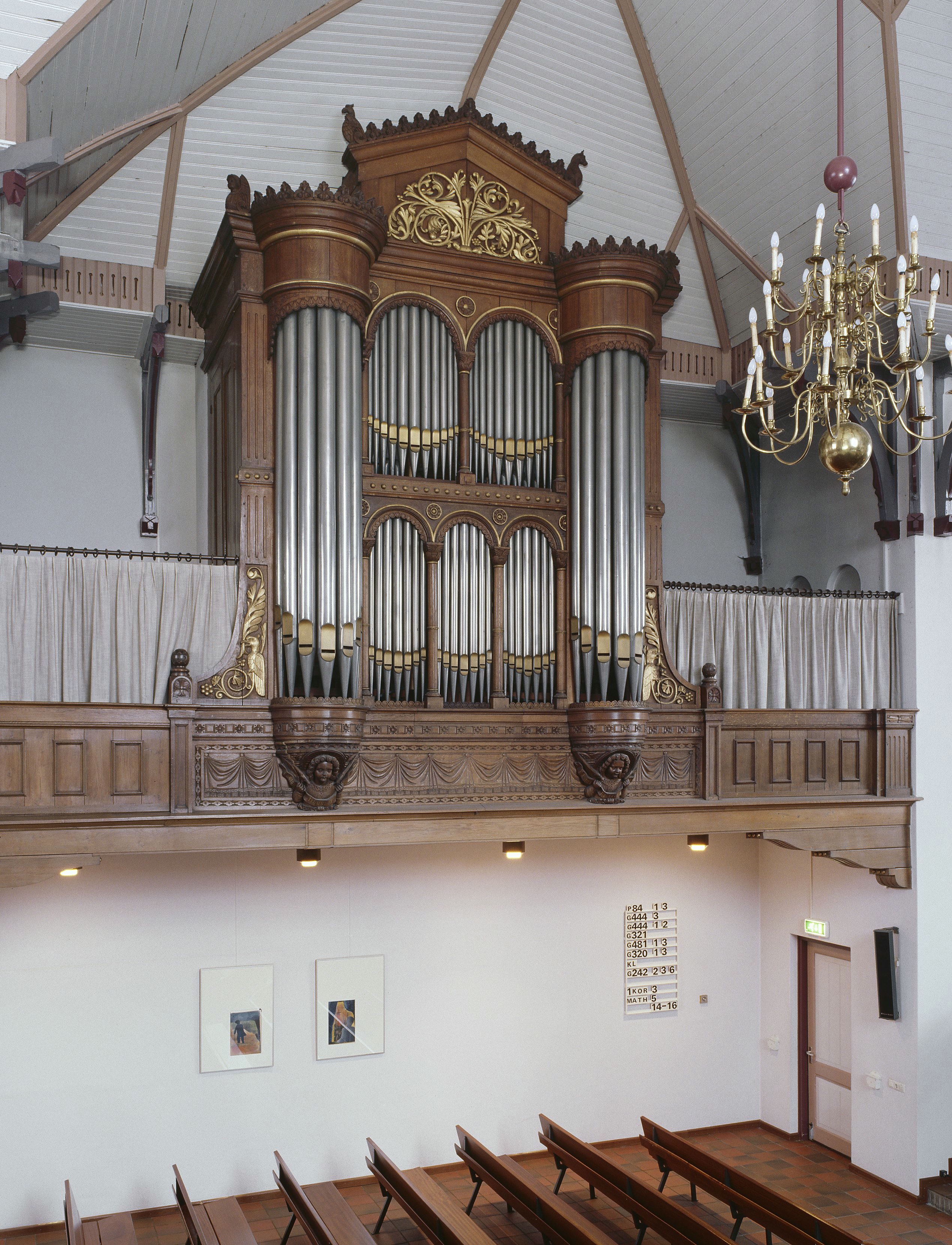 Gereformeerde Noorderkerk: Interieur, aanzicht orgel, orgelnummer 399 (opmerking: Gefotografeerd voor Het Historische Orgel in Nederland 1878-1886, Bladzijde 213)